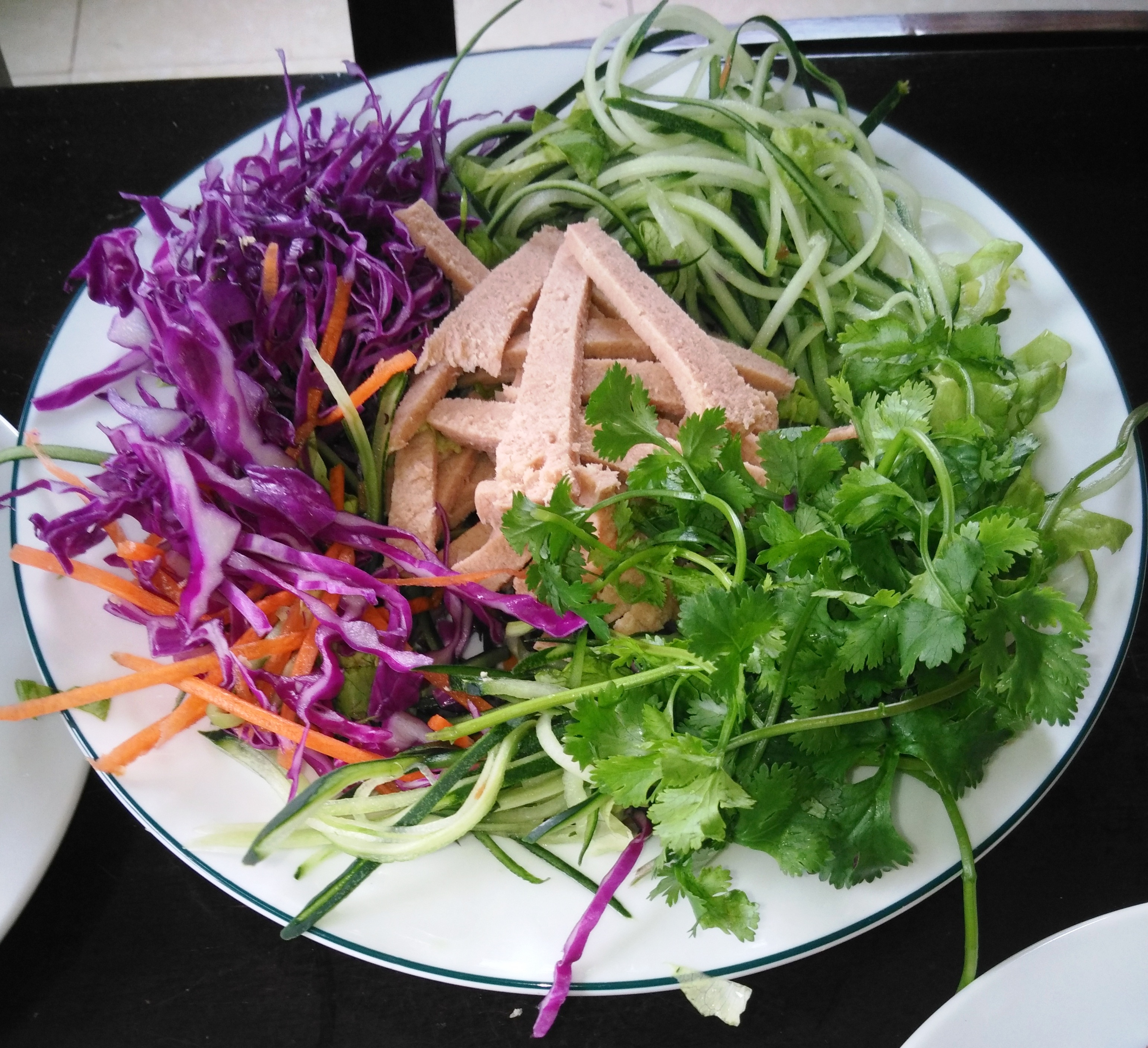 Gỏi xa lát (bắp cải tím, cà rốt, hành tây, dưa leo, chả) cúng đưa Tết 2018